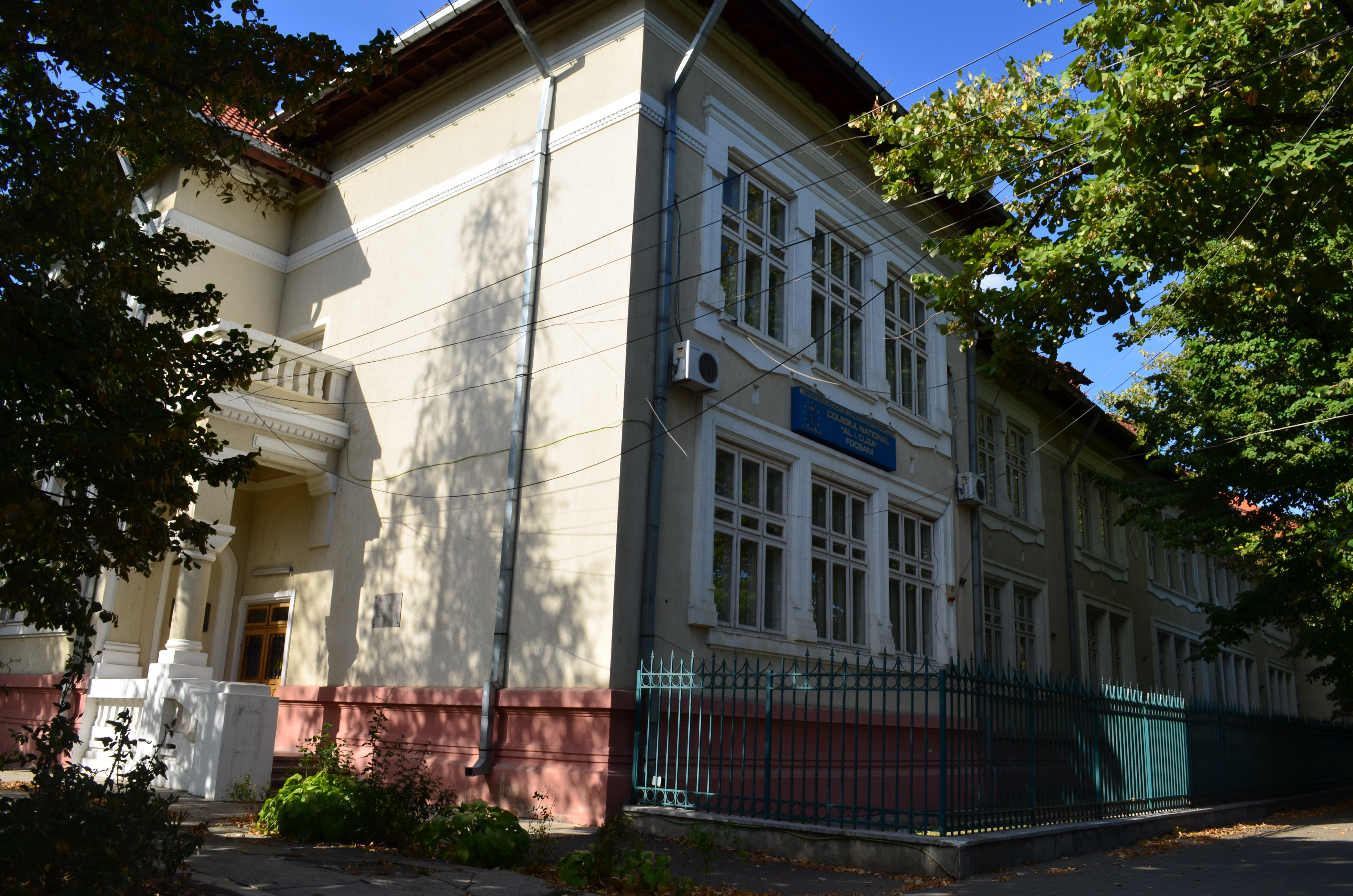 Alexandru Ioan Cuza National College in Focșani